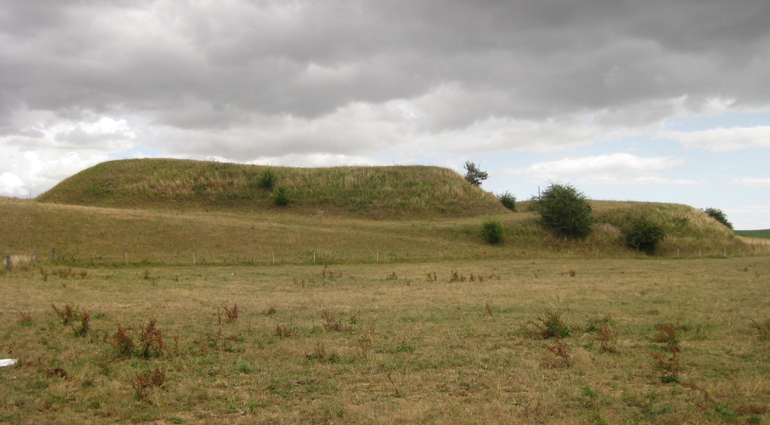 Vallen, Medeltida borglämning i Tomelilla kommun.